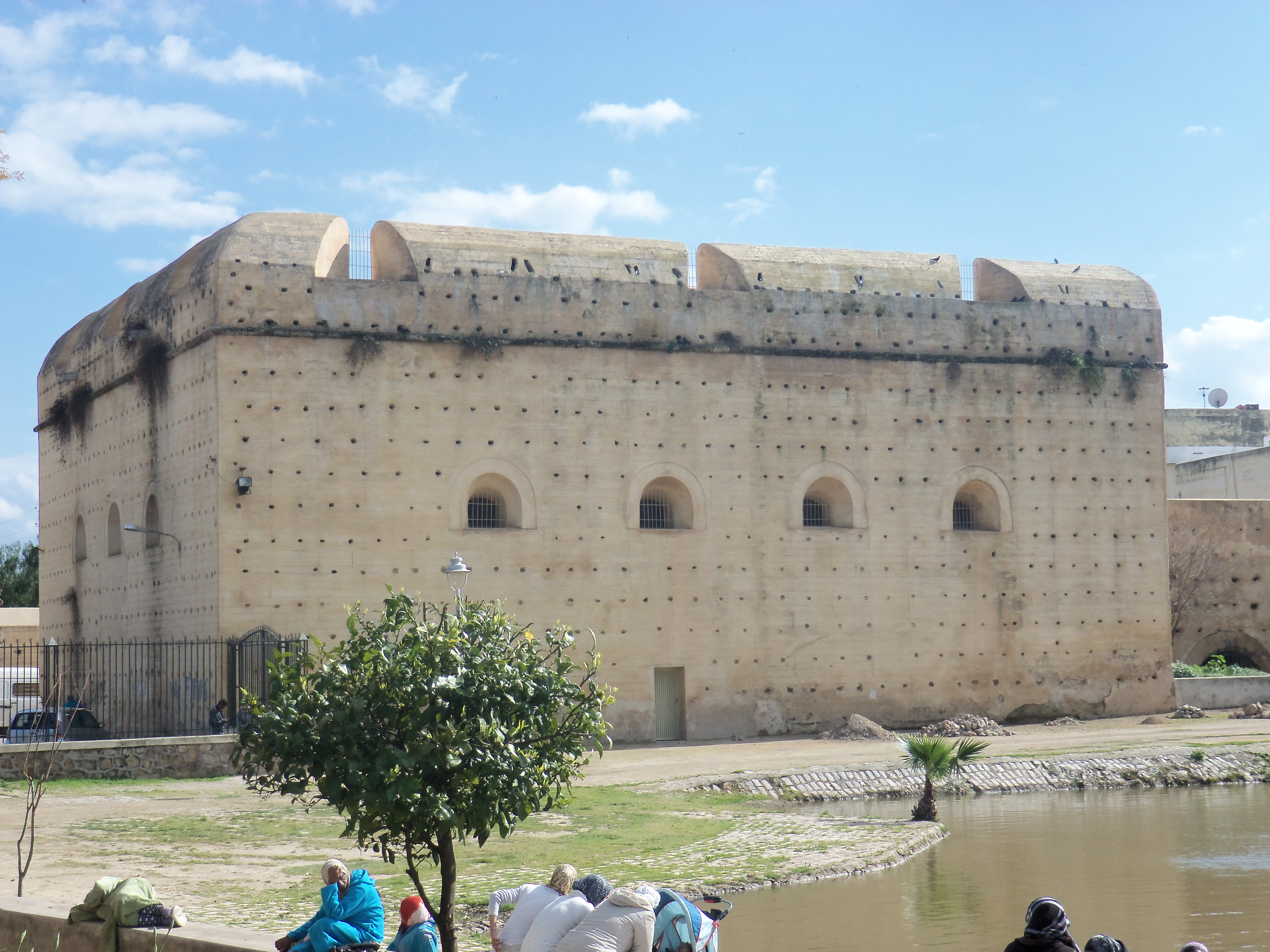 برج الشيخ احمد المطل على حديقة جنان سبيل و يعود تاريخ بناءه للقرن 16 لحقبة الدولة السعدية